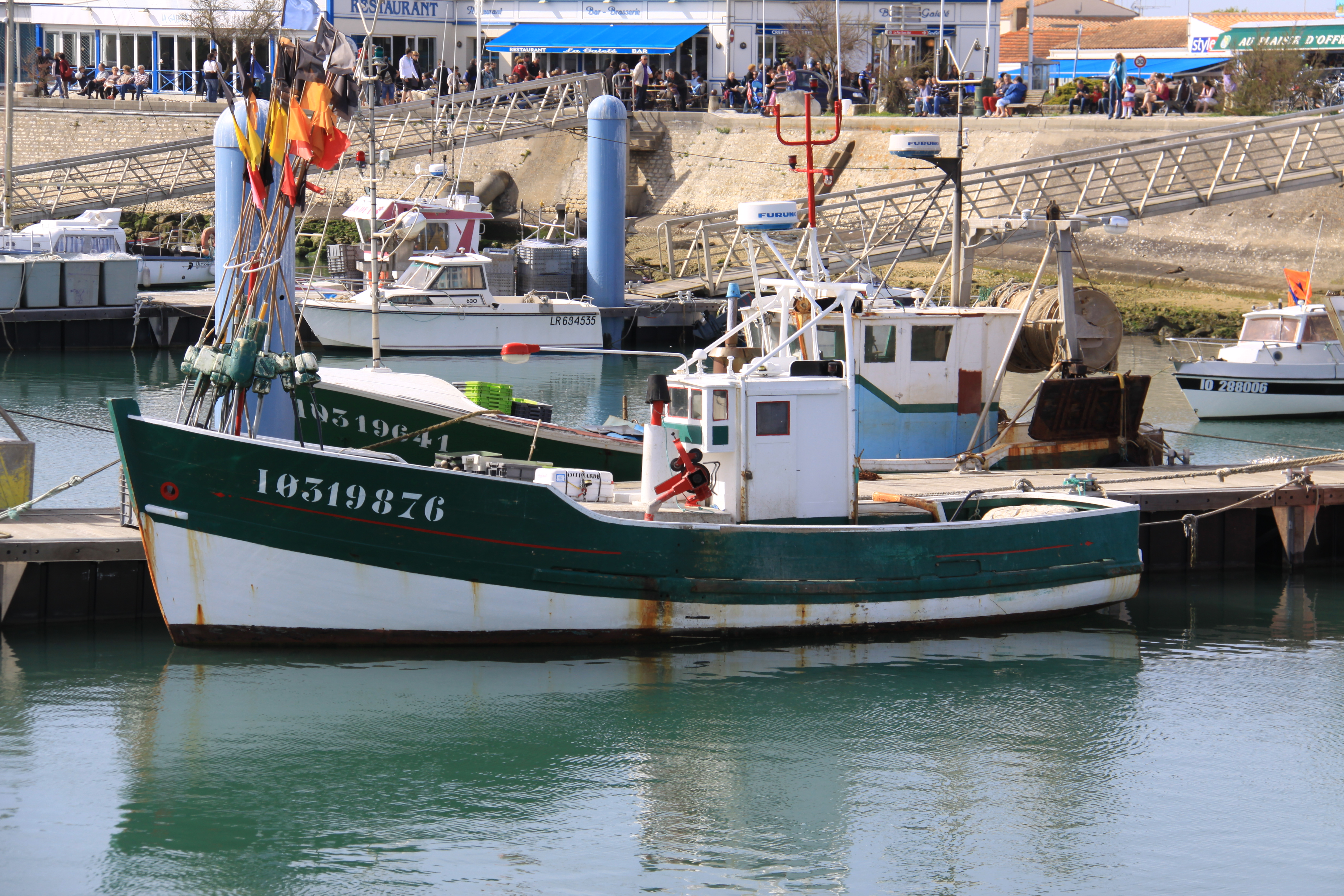 Un ligneur à son emplacement de ponton dans le port de La Cotinière. Sur un ligneur la technique de pêche consiste à déposer sur le fond de la mer des lignes de plusieurs centaines de mètres munies d' hameçons espacés d' un certain nombre de centimètres. Ce bateau en bois appelé "La Cotinarde" a été construit en 1956. La Cotinière (Commune de Saint-Pierre d' Oléron), Île d' Oléron, Charente Maritime, France.